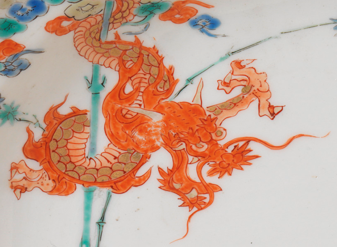 DETAIL of following item: Bord van porselein met een gelobde rand, beschilderd op het glazuur in blauw rood, groen, geel, zwart en goud met een tijger bij prunus, omhoog kijkend naar een draak die om een bamboe kronkelt. Bruine rand. Drie proenen in de voetring. Kakiemon. Label Line: anoniem, ca. 1670 - ca. 1690, porselein met emailkleuren